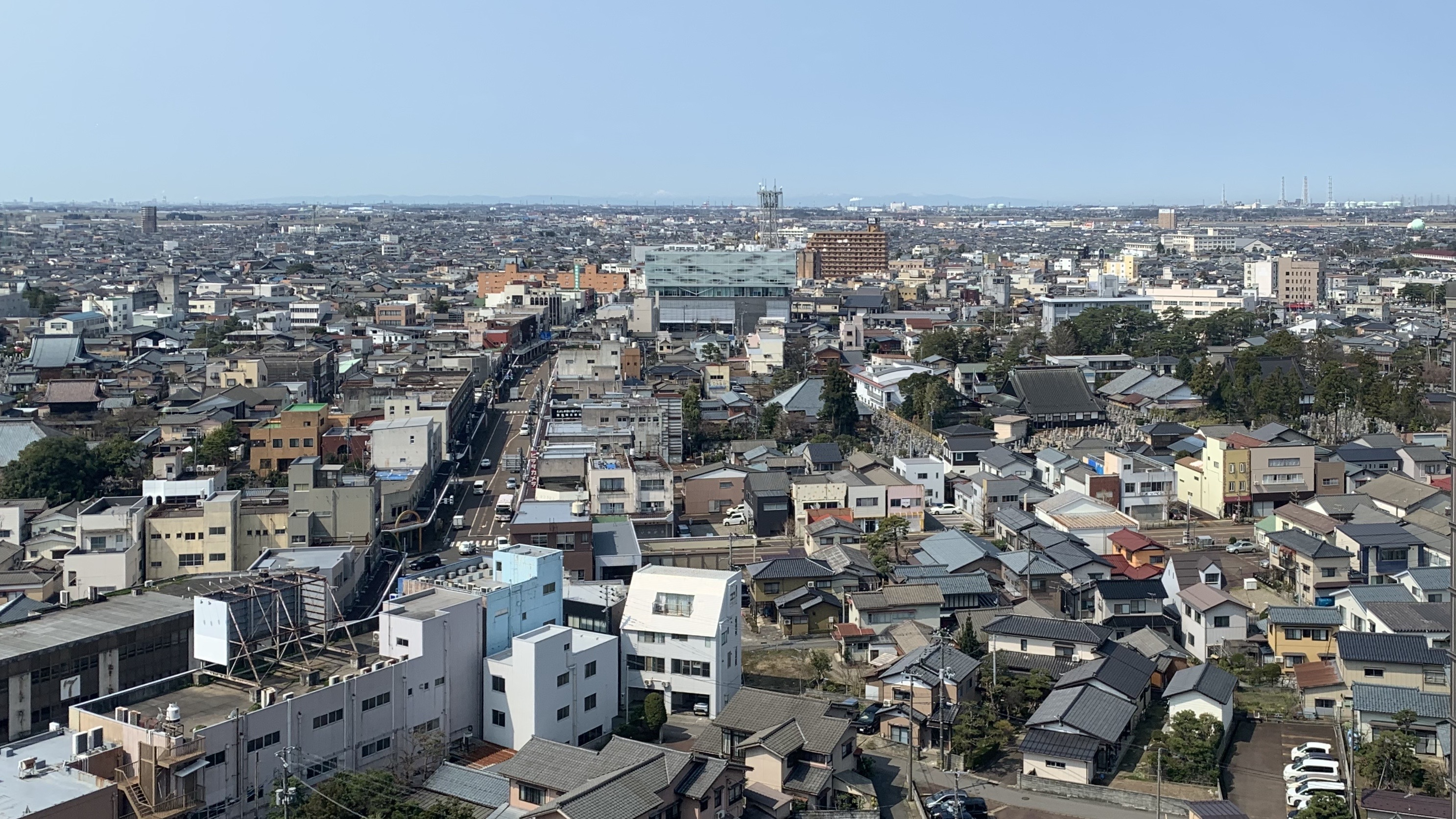 新発田市街俯瞰（2020年3月）